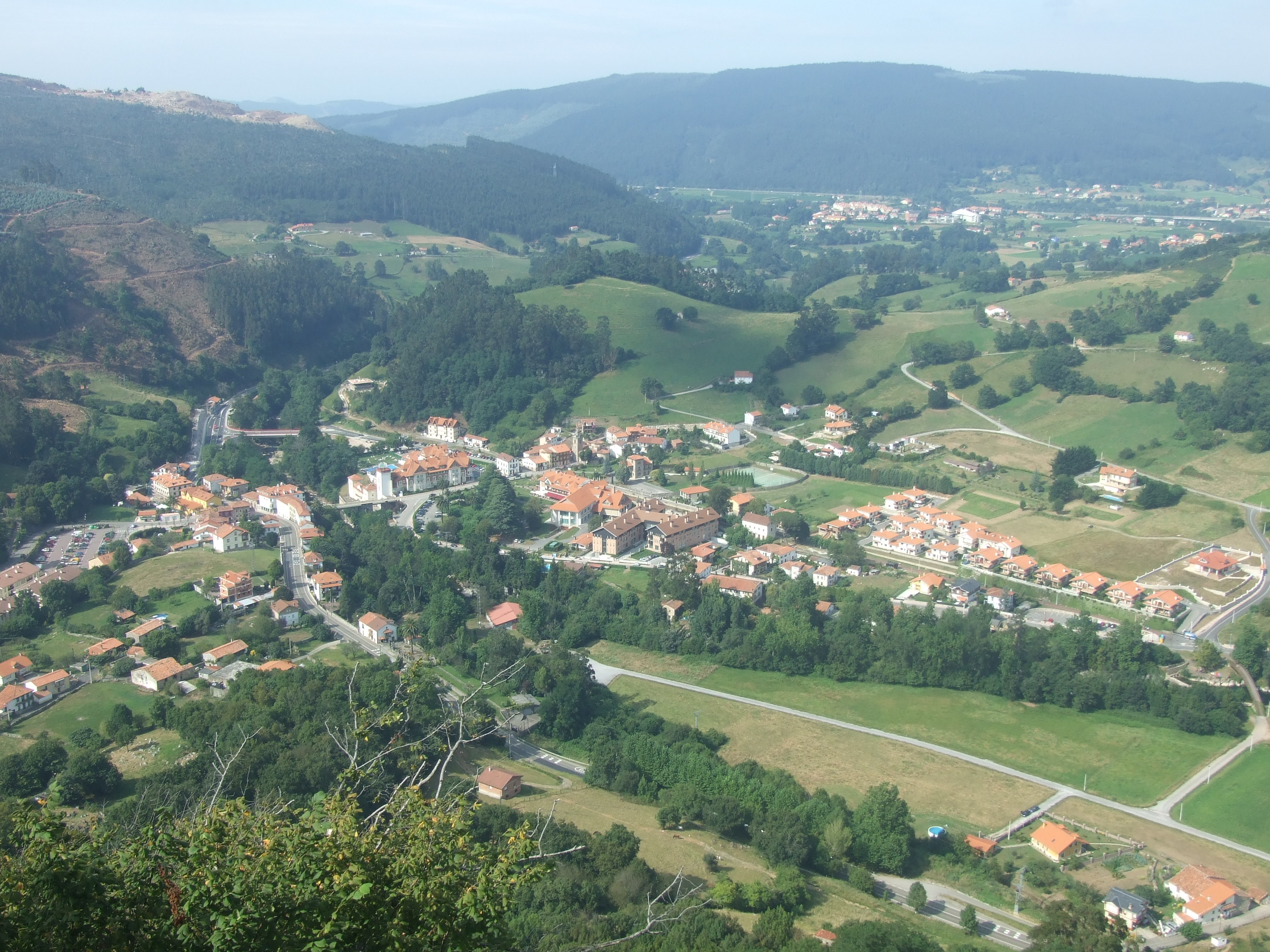 Vista del pueblo de Puente Viesgo, Cantabria